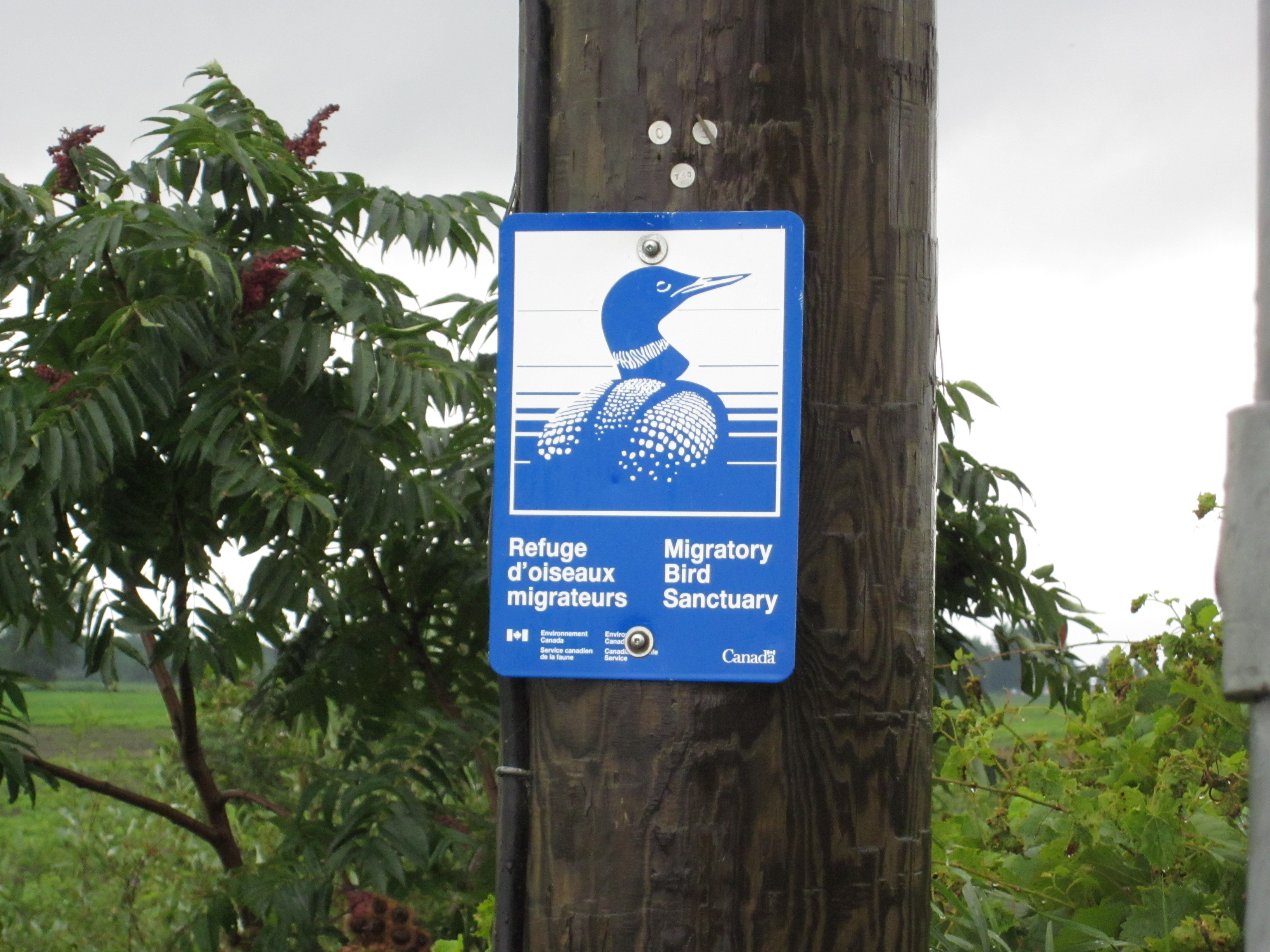 Insigne de limite d'un refuge d'oiseaux migrateur